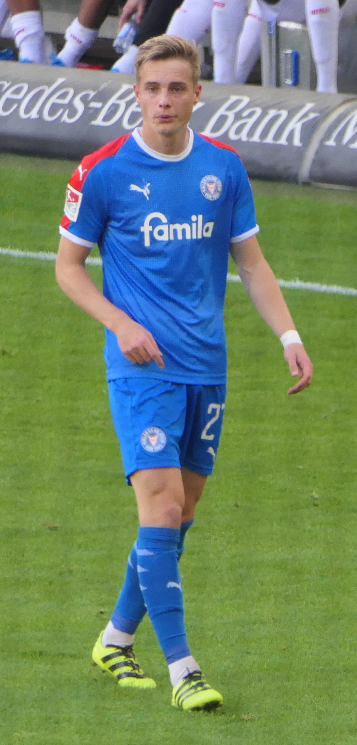 Der Fussballprofi Finn Porath im Trikot von Holstein Kiel beim Auswärtsspiel gegen den VfB Stuttgart am 20.10.2019.